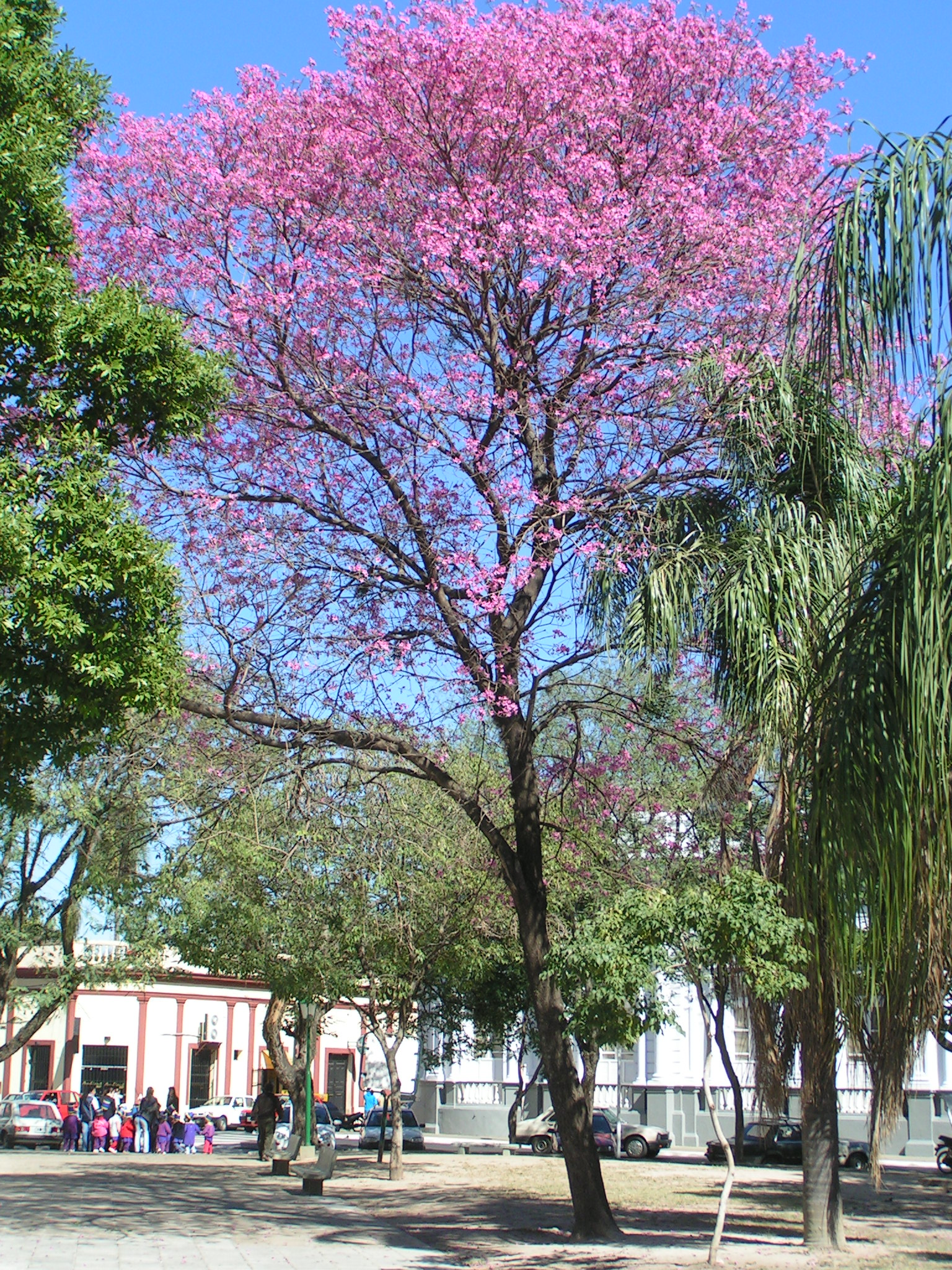 Lapacho rosado (Tabebuia impetiginosa)